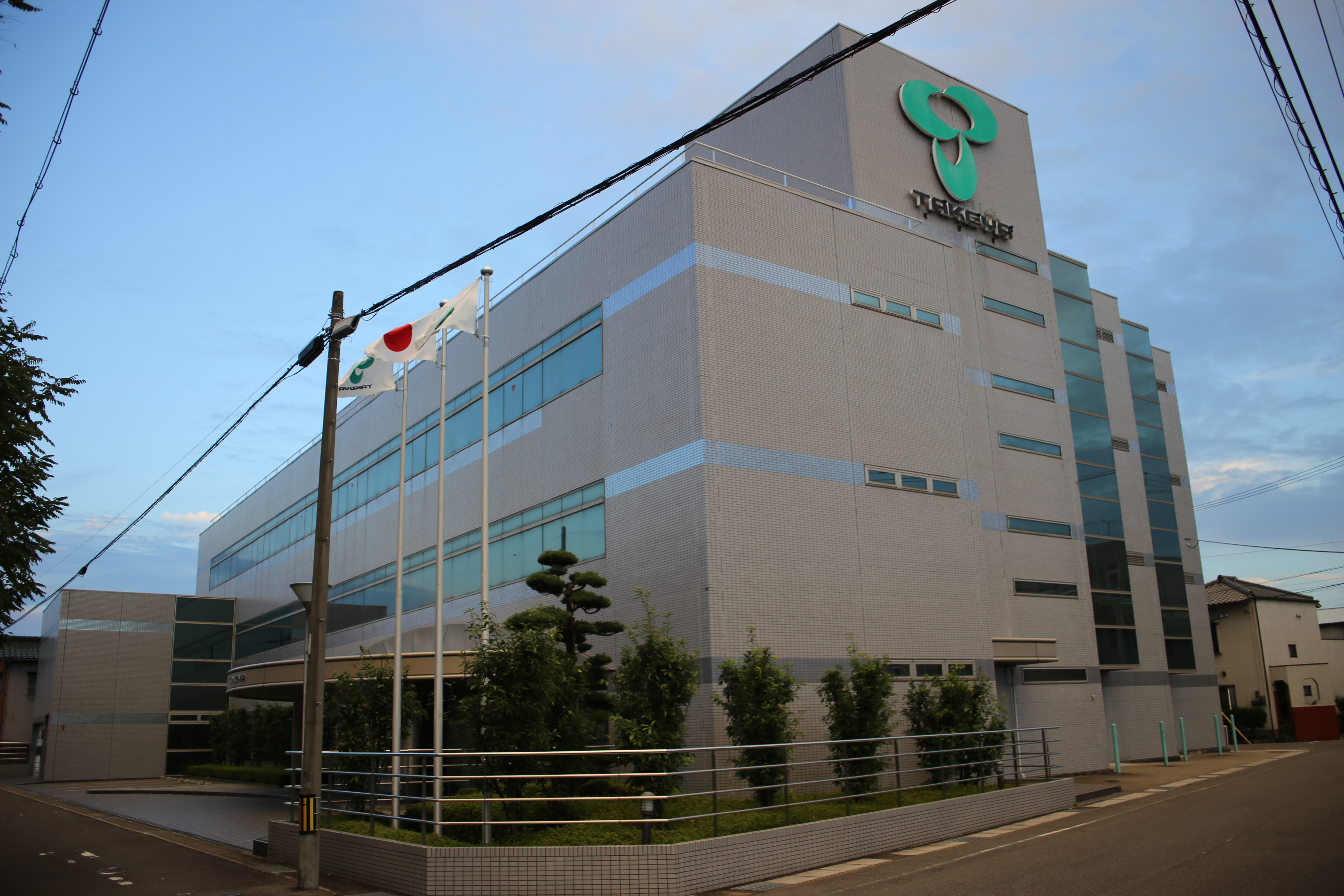 愛知県春日井市の竹屋本社